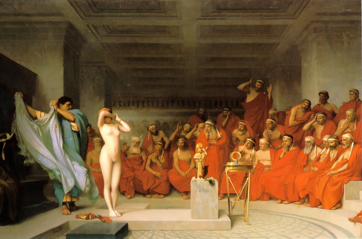 Phryne devant l'areopagePhryne revealed before the Areopagustitle QS:P1476,fr:"Phryne devant l'areopage" label QS:Lfr,"Phryne devant l'areopage" label QS:Len,"Phryne revealed before the Areopagus"